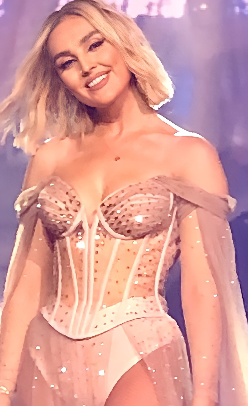 Les Little Mix performant Told You So durant leur concert au Dome De Paris, pendant leur tournée du LM5 tour, le 28 septembre 2019. De gauche a droite, Leigh-Anne, Jesy, Perrie & Jade.